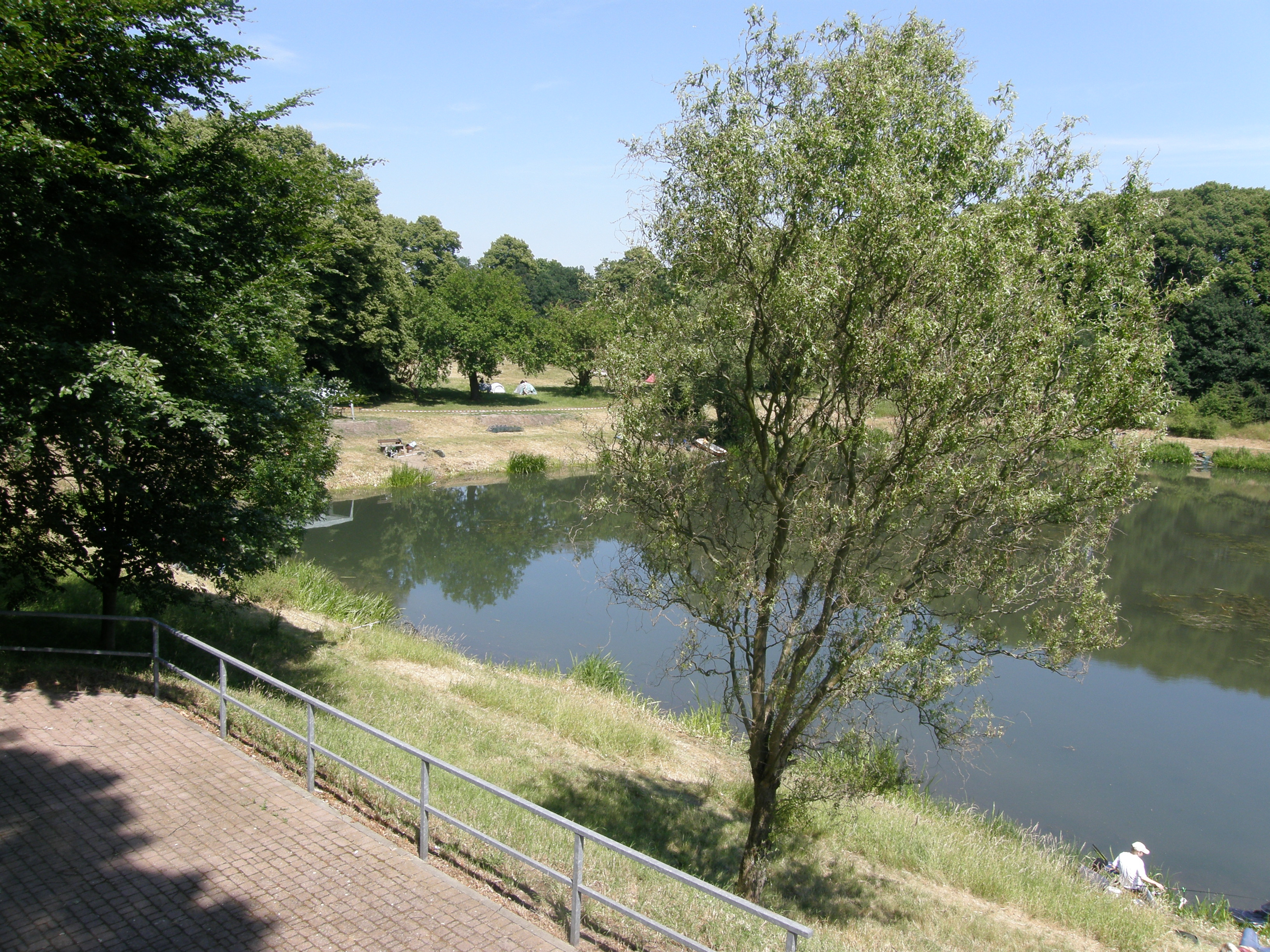 Der ehemalige Lippehafen bei Wesel, nördliches Ende im Landschaftsschutzgebiet „Wackenbruch, Krudenburger Wald, Aaper Busch, Randbereiche der Lippeaue“